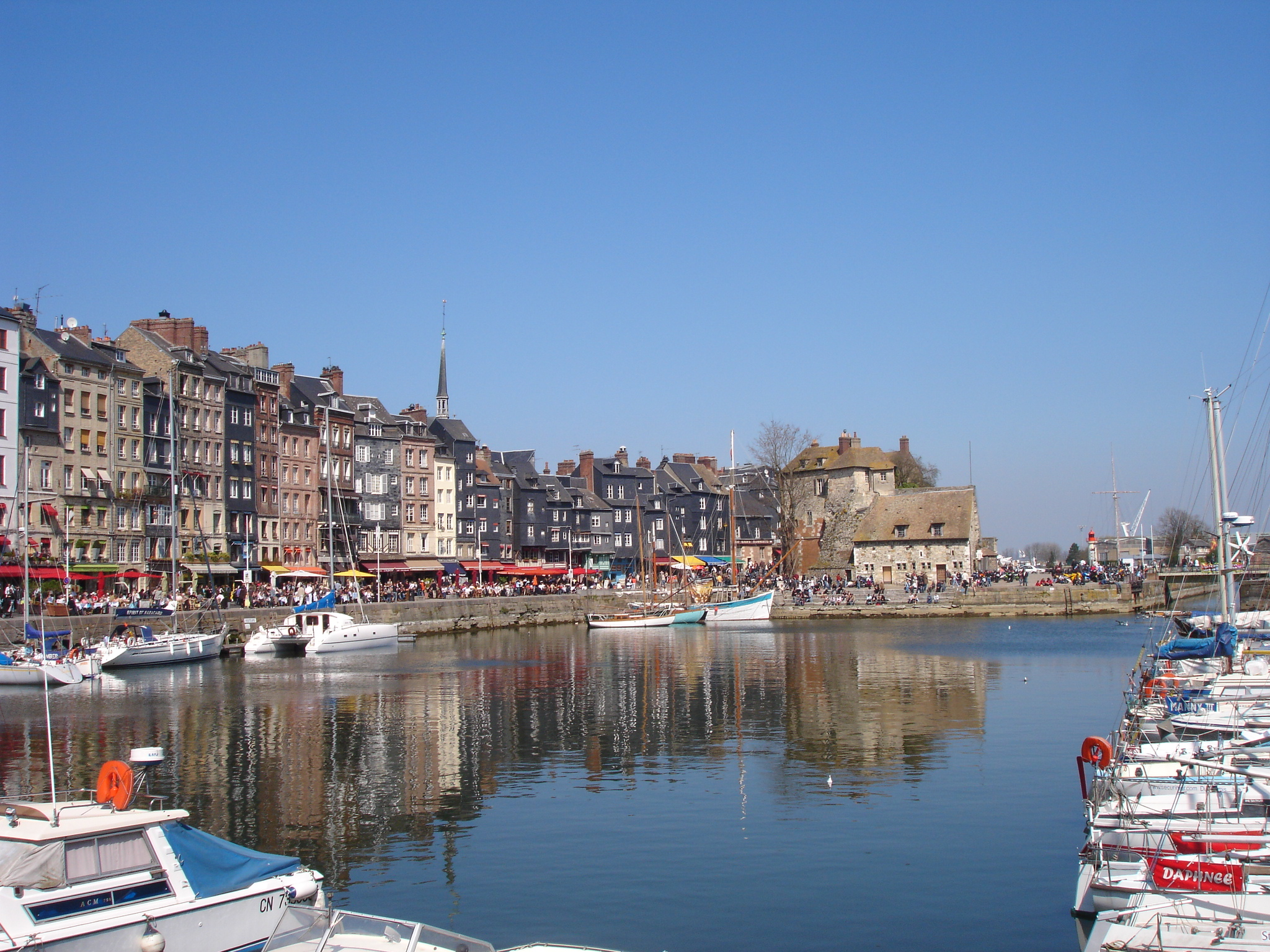 France, Calvados (14), Honfleur, église